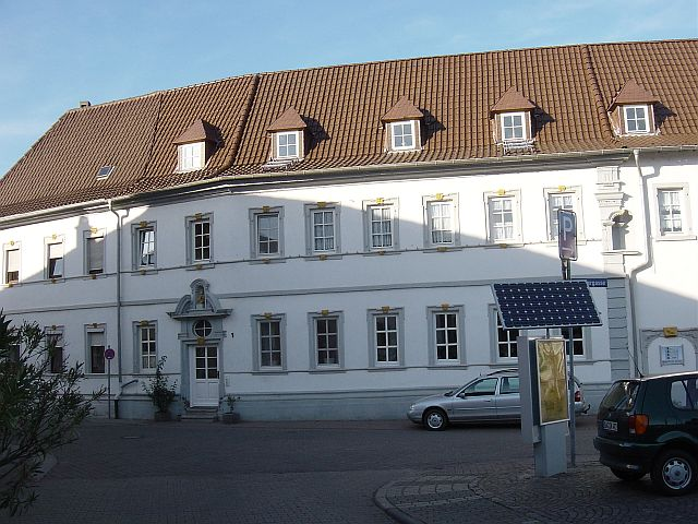 Ehemaliges Gasthaus 'Drei König'